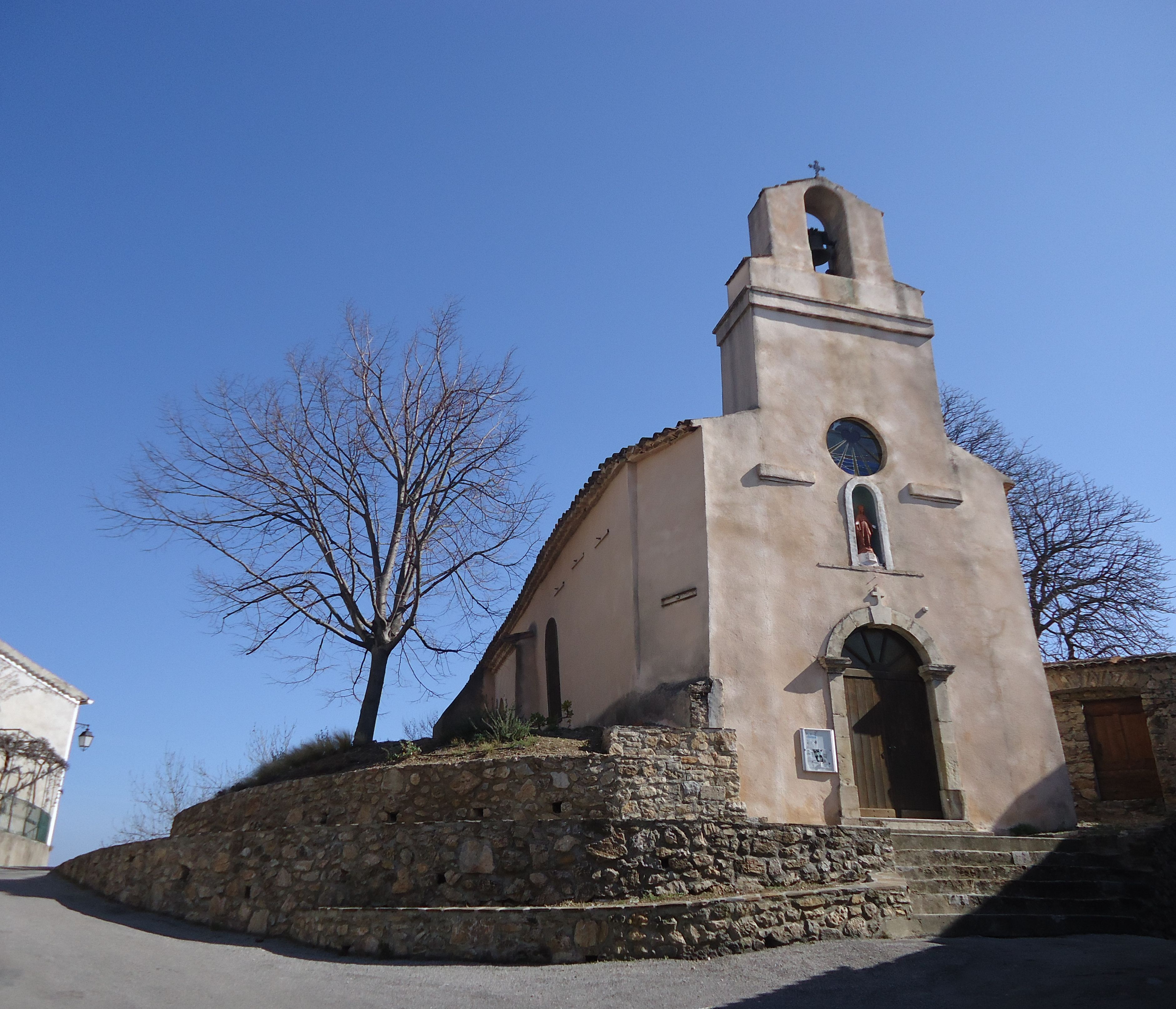 photographie prise au sortir de l'hiver (27 mars 2013) d'où l'état des arbres